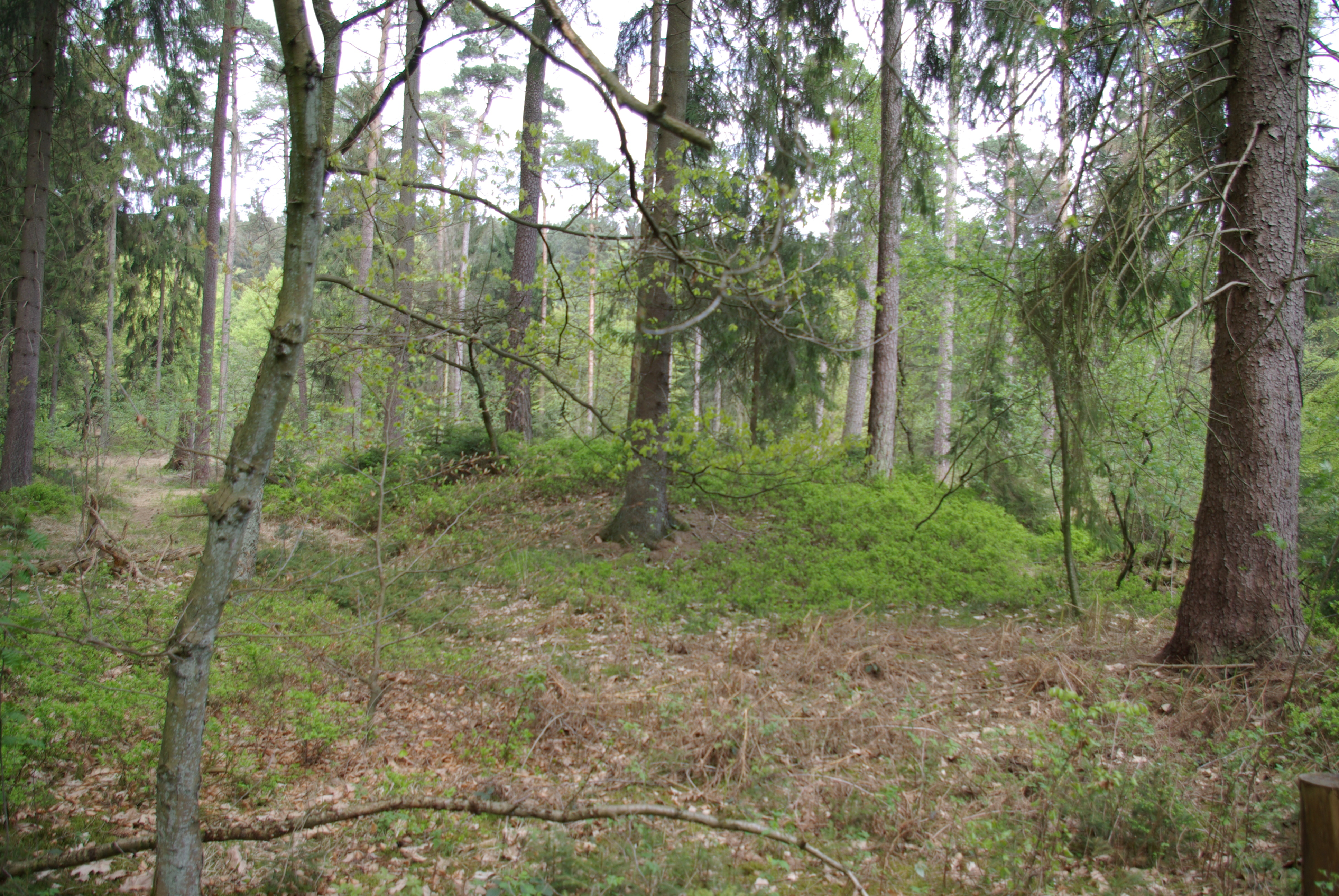 Hügelgrab am Donoperteich zwischen Pivitsheide V. H. und Hiddesen im Teutoburger Wald